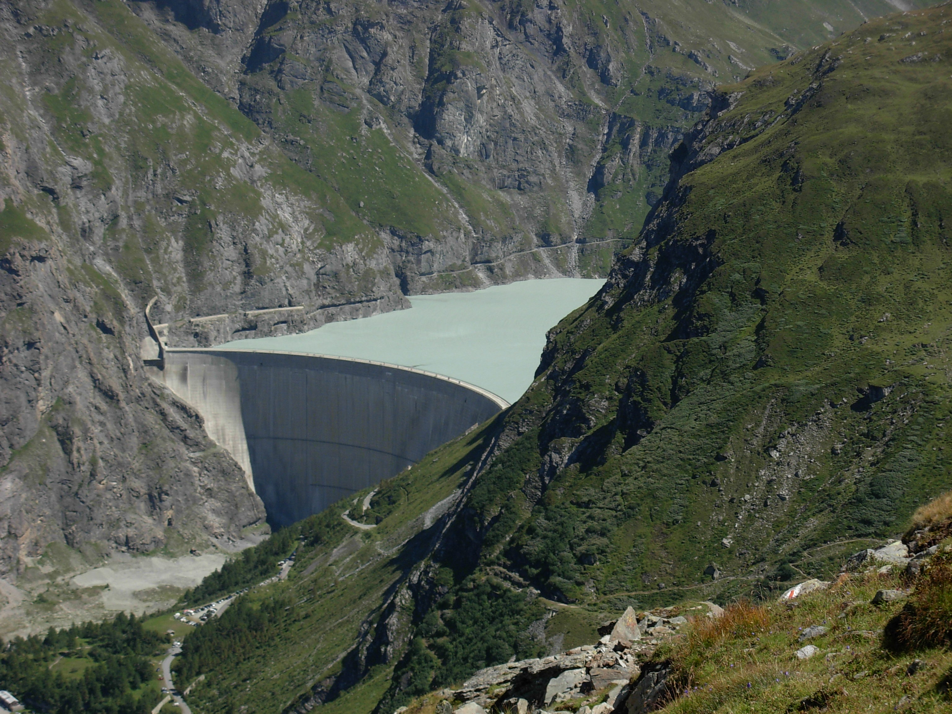 Barrage de Mauvoisin, vu depuis la montée vers le Col des Otanes. Août 2007.